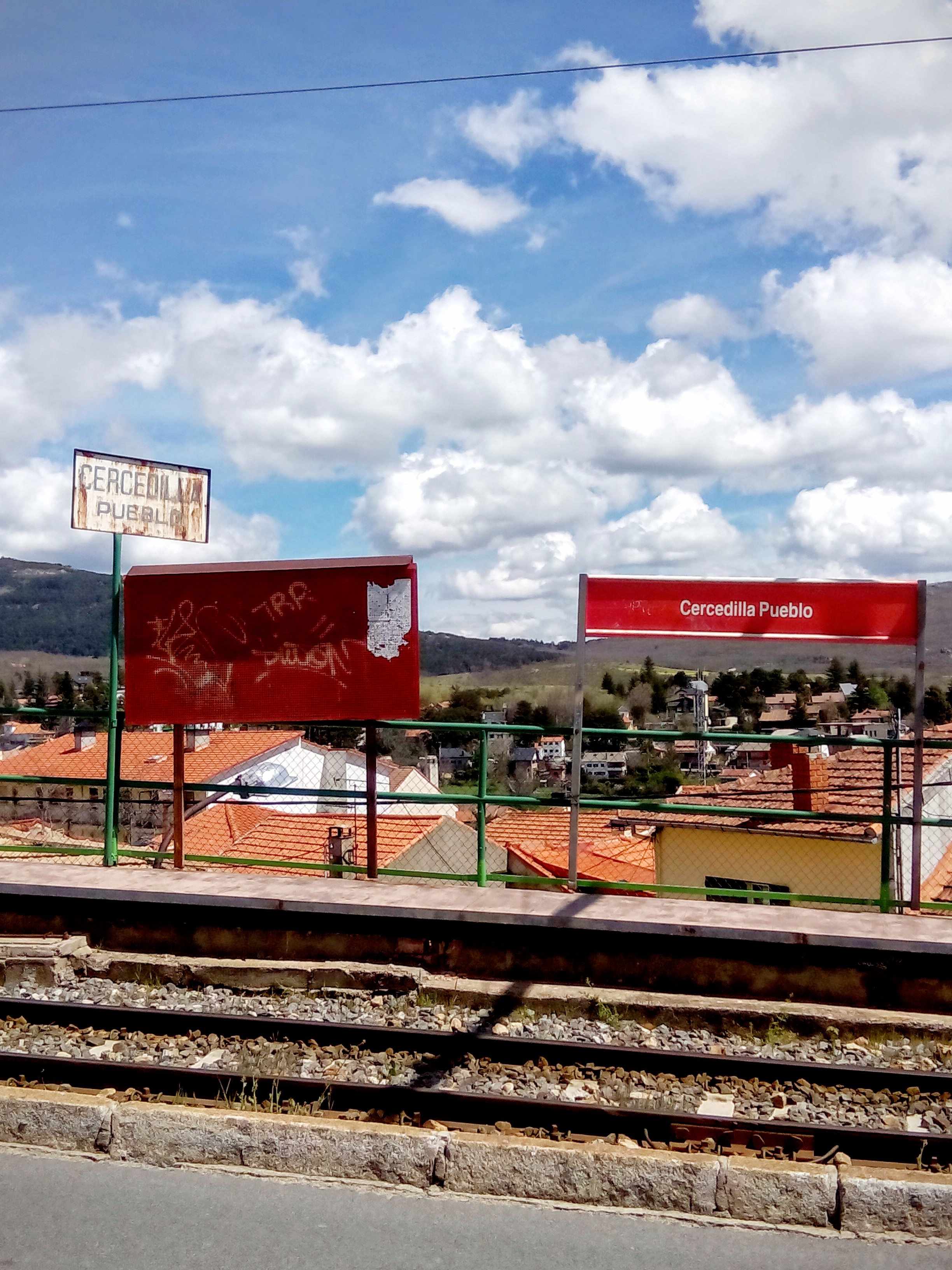 Apeadero de Cercedilla Pueblo